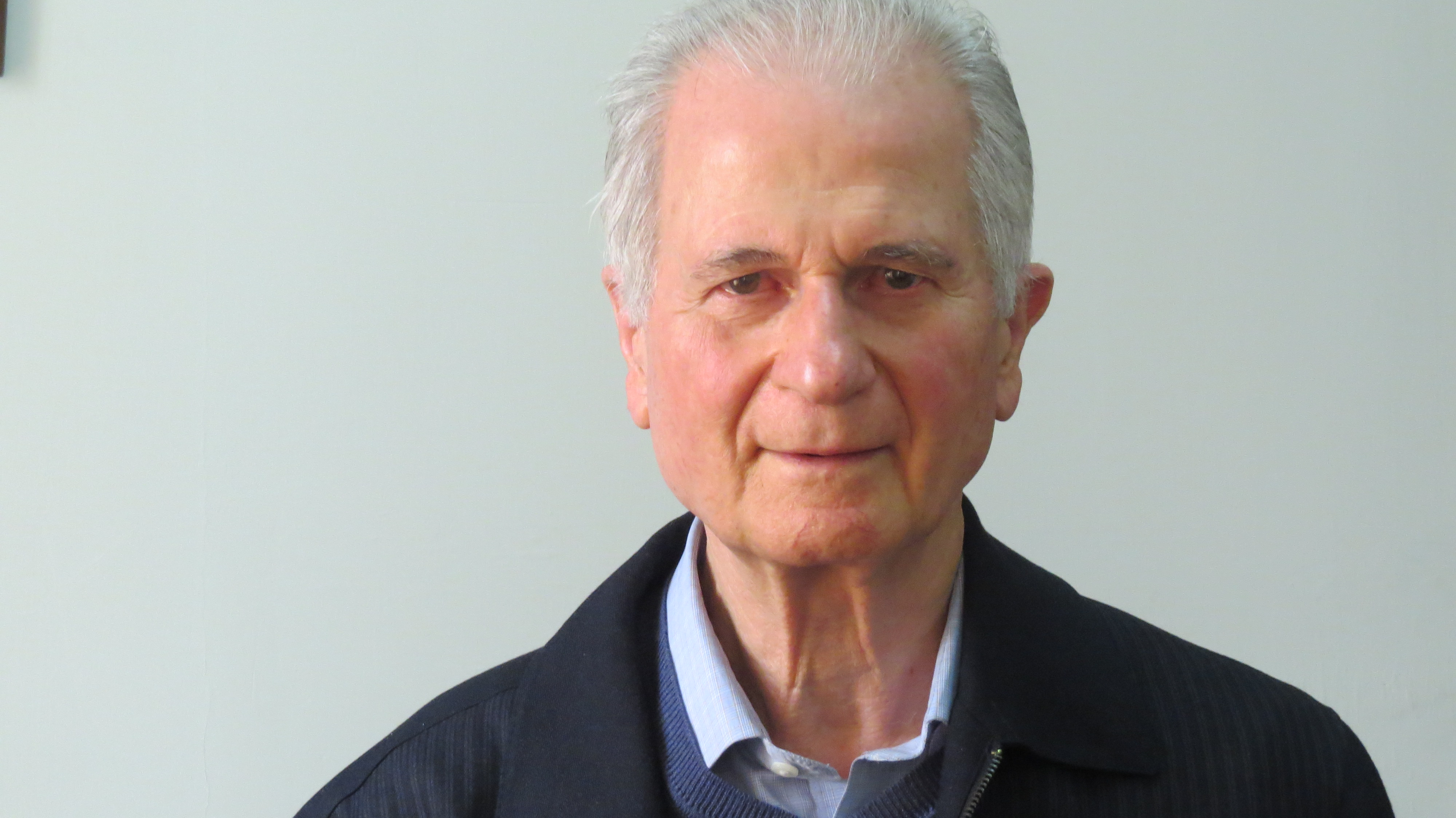 اتاق کار-اسفند1395